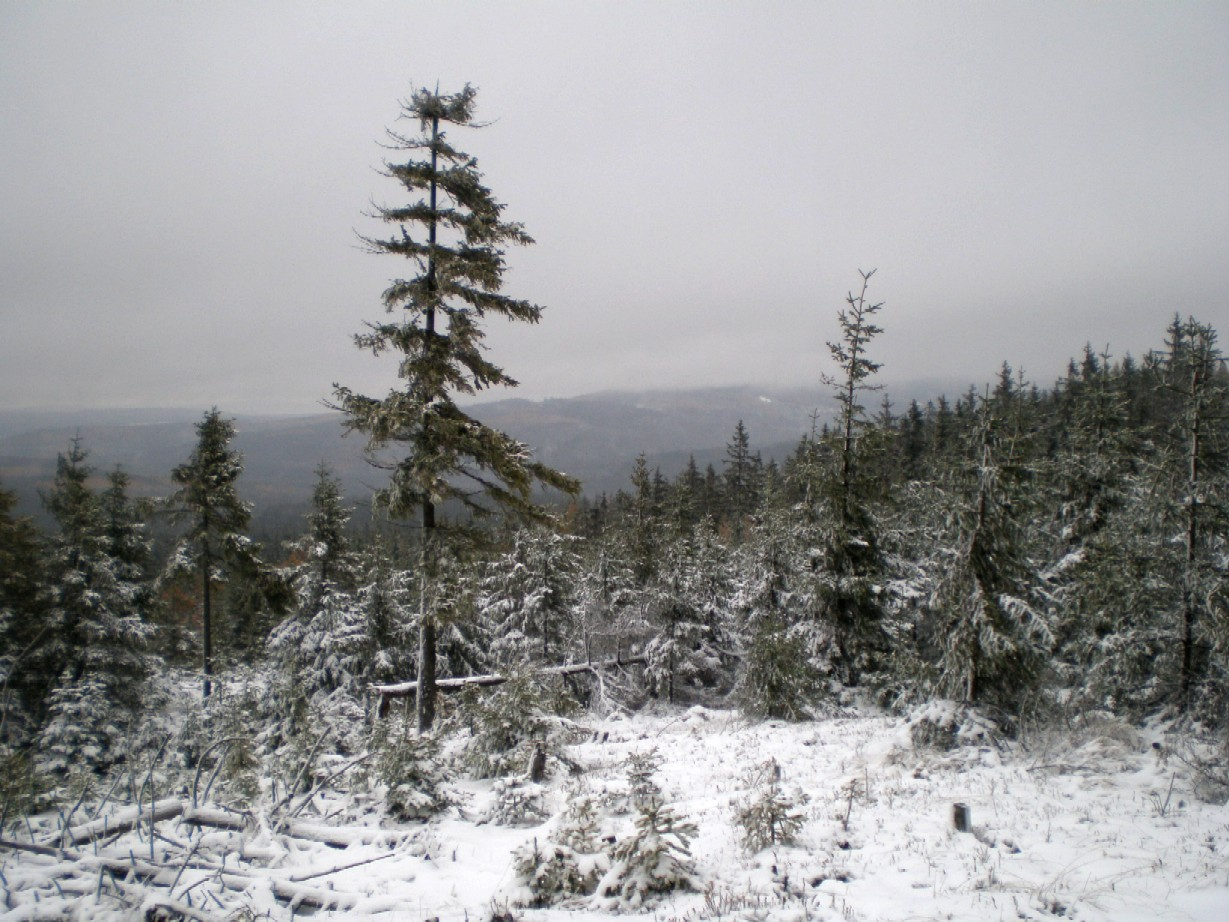 Pohled do Třítrubeckého údolí ze svahu Peteráku